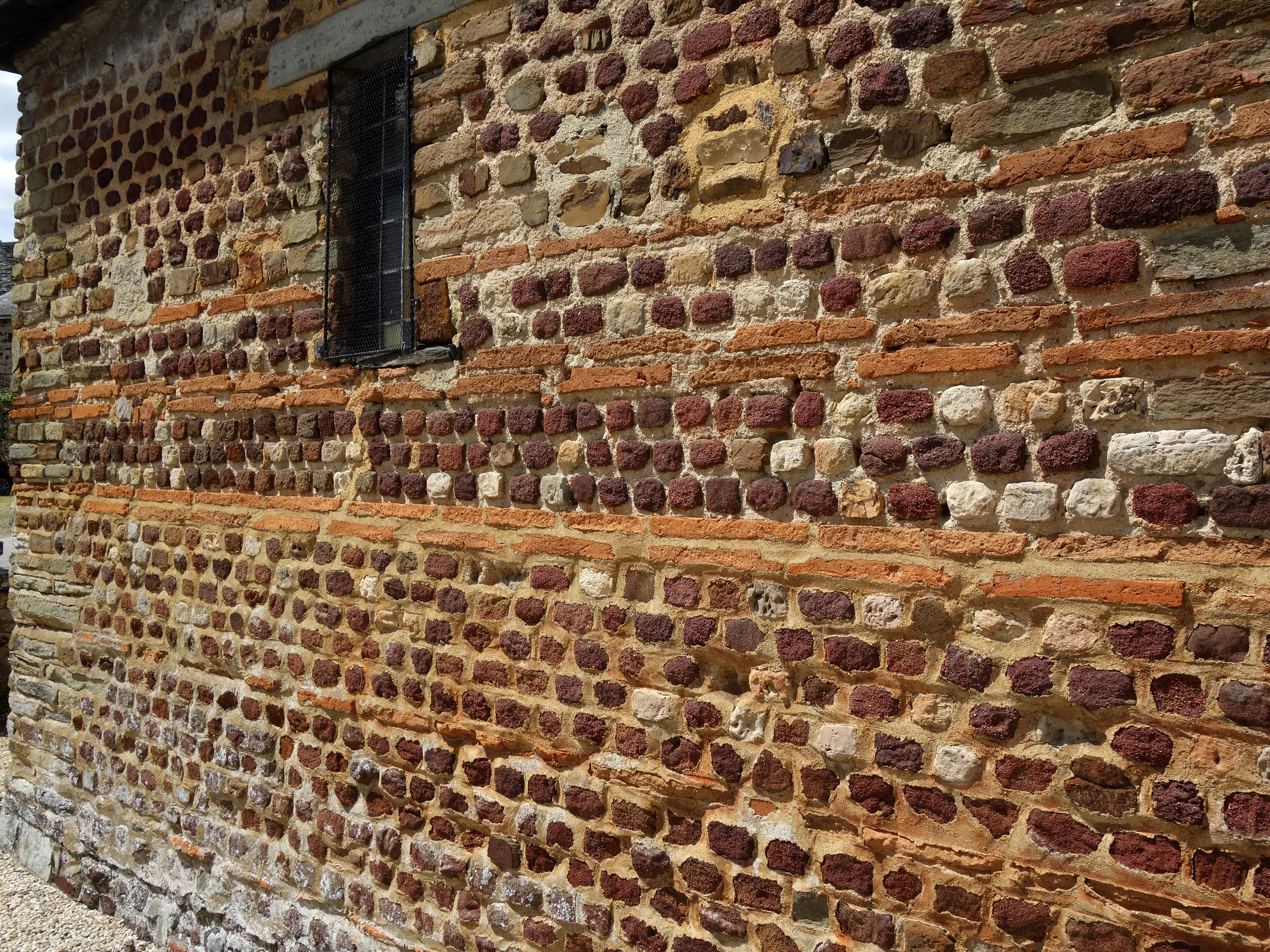 Une grande partie de ses murs extérieurs - ici, celui de l'Ouest - est composée de briques rouges et de moellons de schiste rouge et grès, assemblage typique que l'on retrouve par exemple à la base des remparts des villes antiques de Rennes ou du Mans.